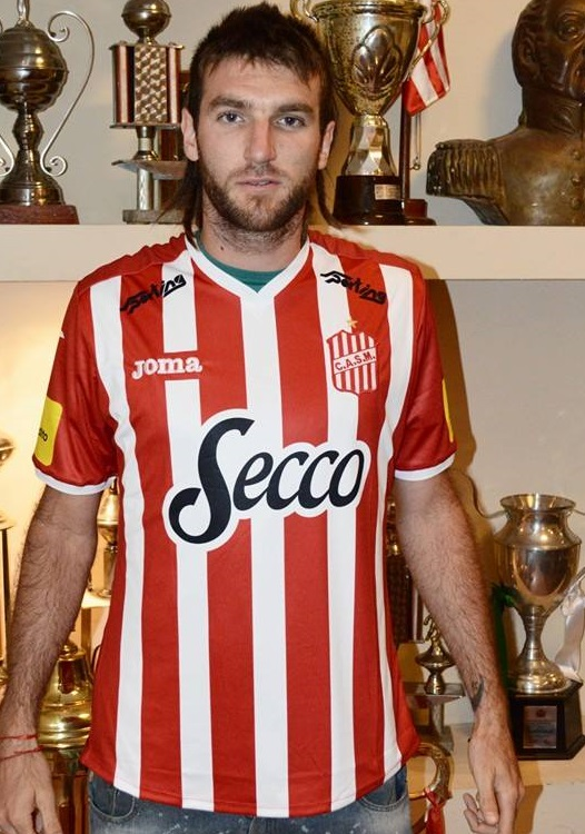 Foto hecha por la página "ciruja".